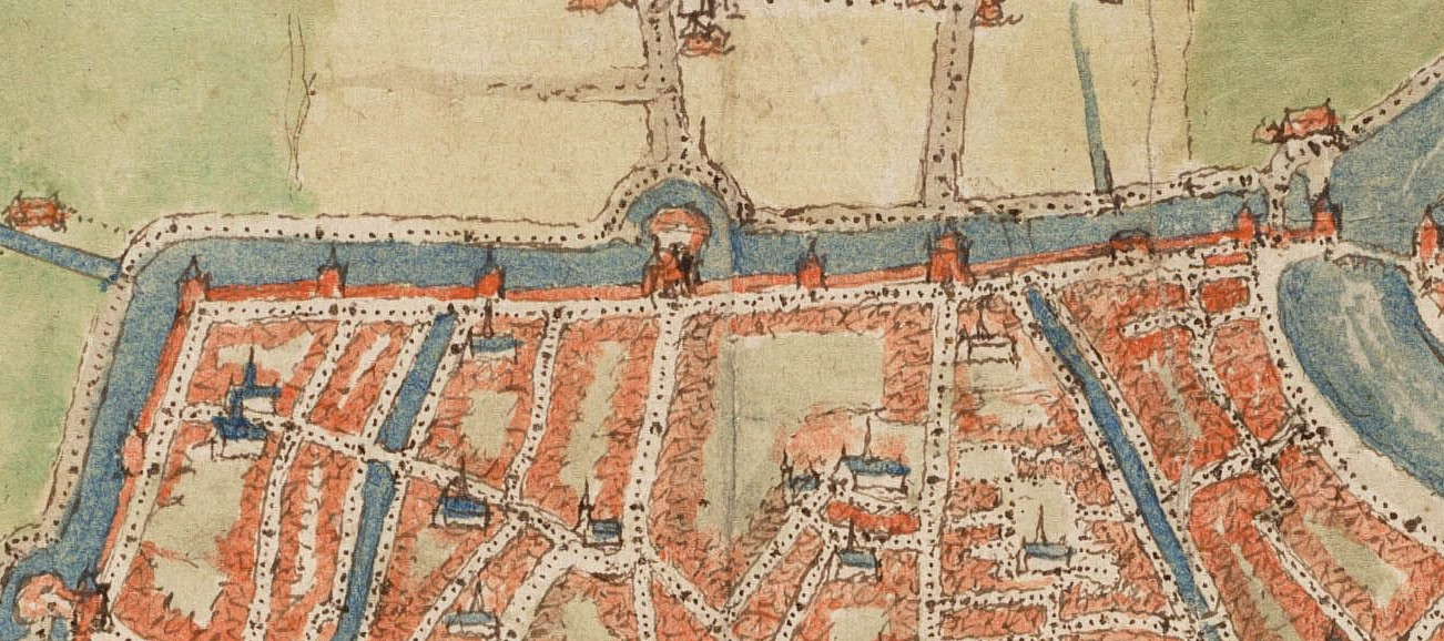 Uitsnede van de kaart van Haarlem van Jacob van Deventer 1550-1570, noordelijke gracht, Kruispoort, Janspoort